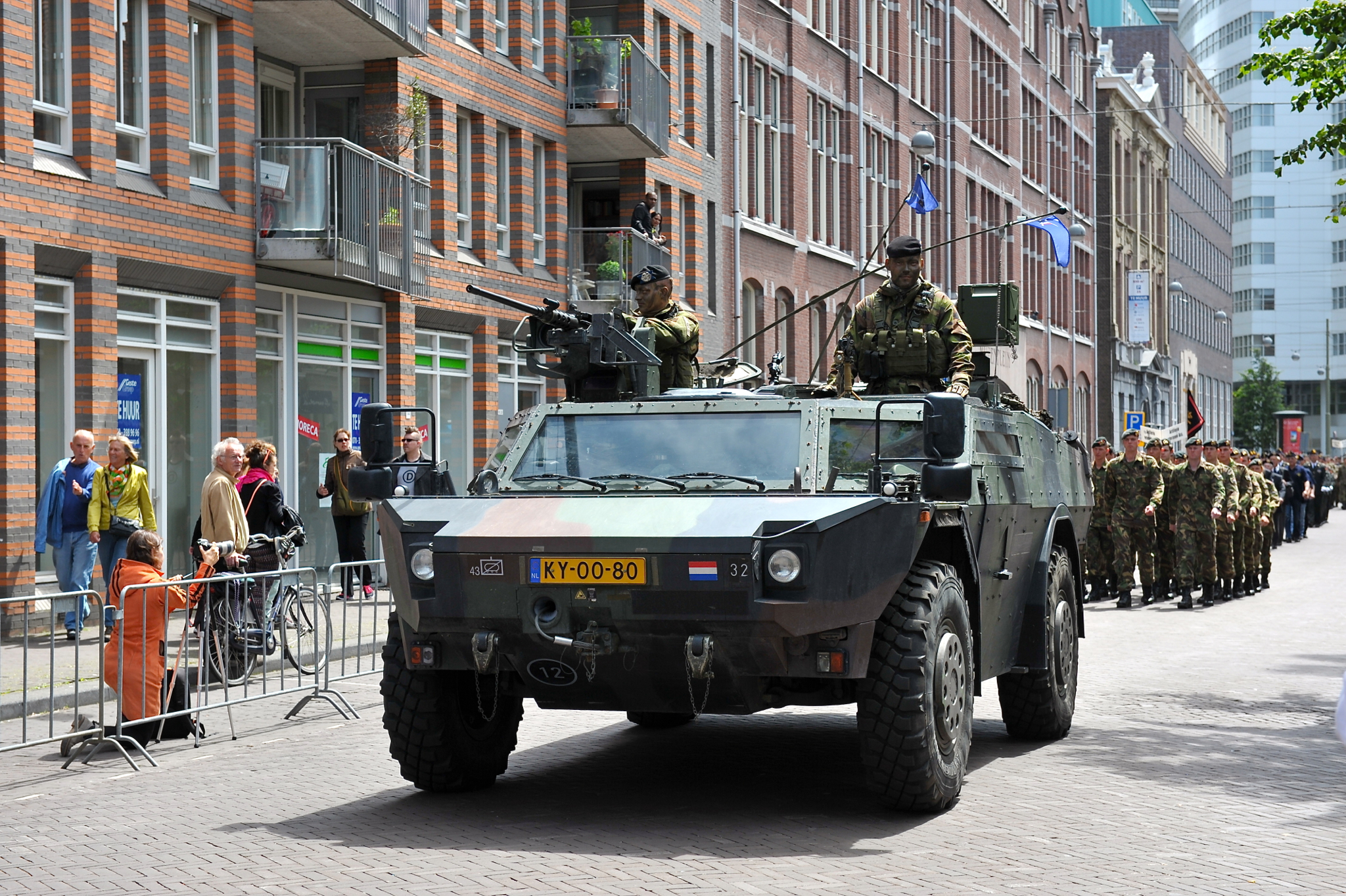 Fennik (gepantserd) verkenningsvoertuig, hier in gebruik bij de Huzaren van Boreel.